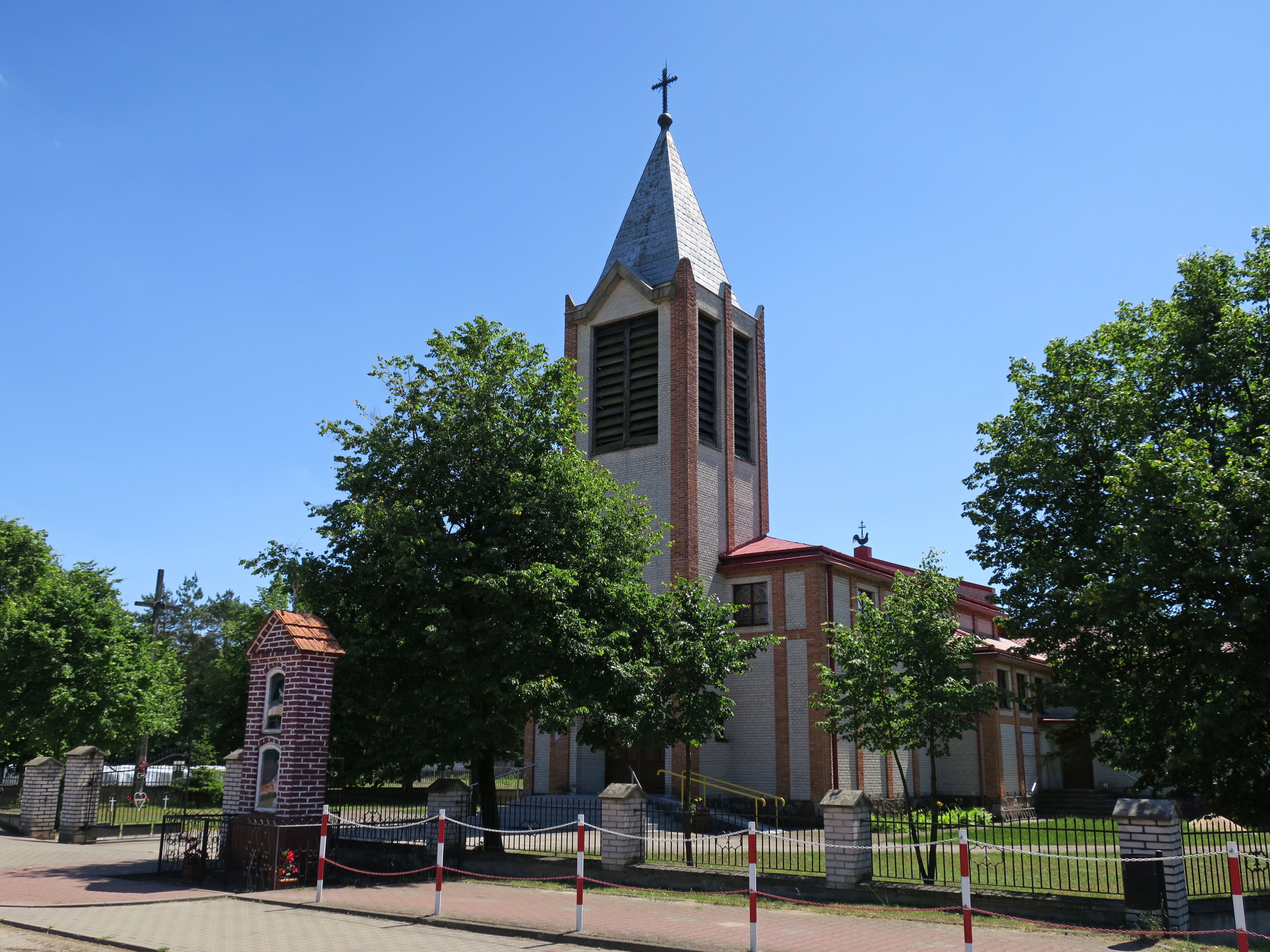 Kościół w Ziomku (powiat ostrołęcki).